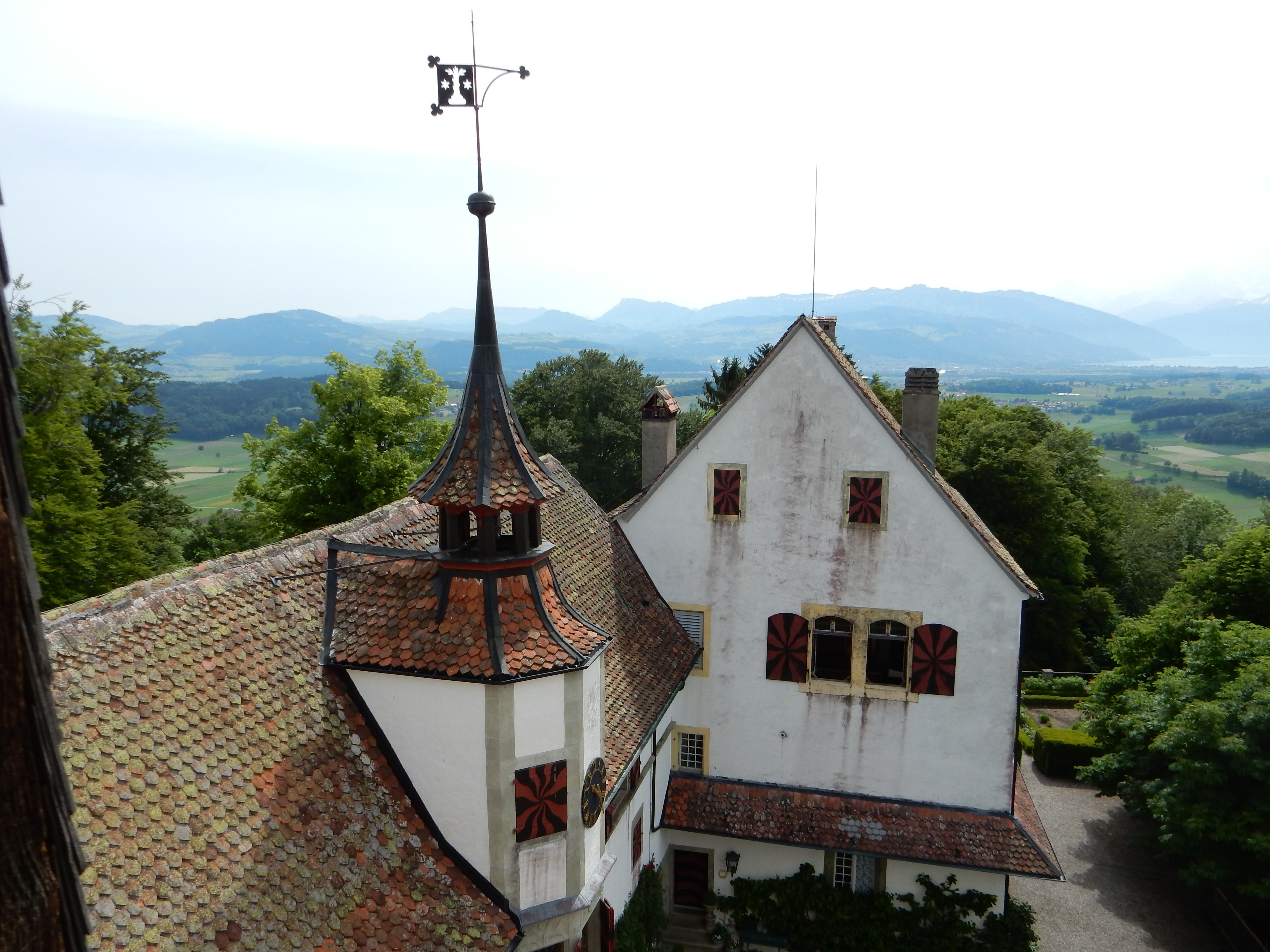 Schloss Burgistein: Blick vom Hauptgebäude gegen Osten, rechts der Thunersee